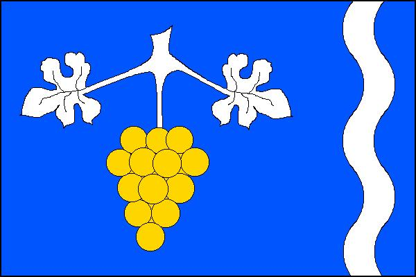 Vlajka obce Malá Šťáhle